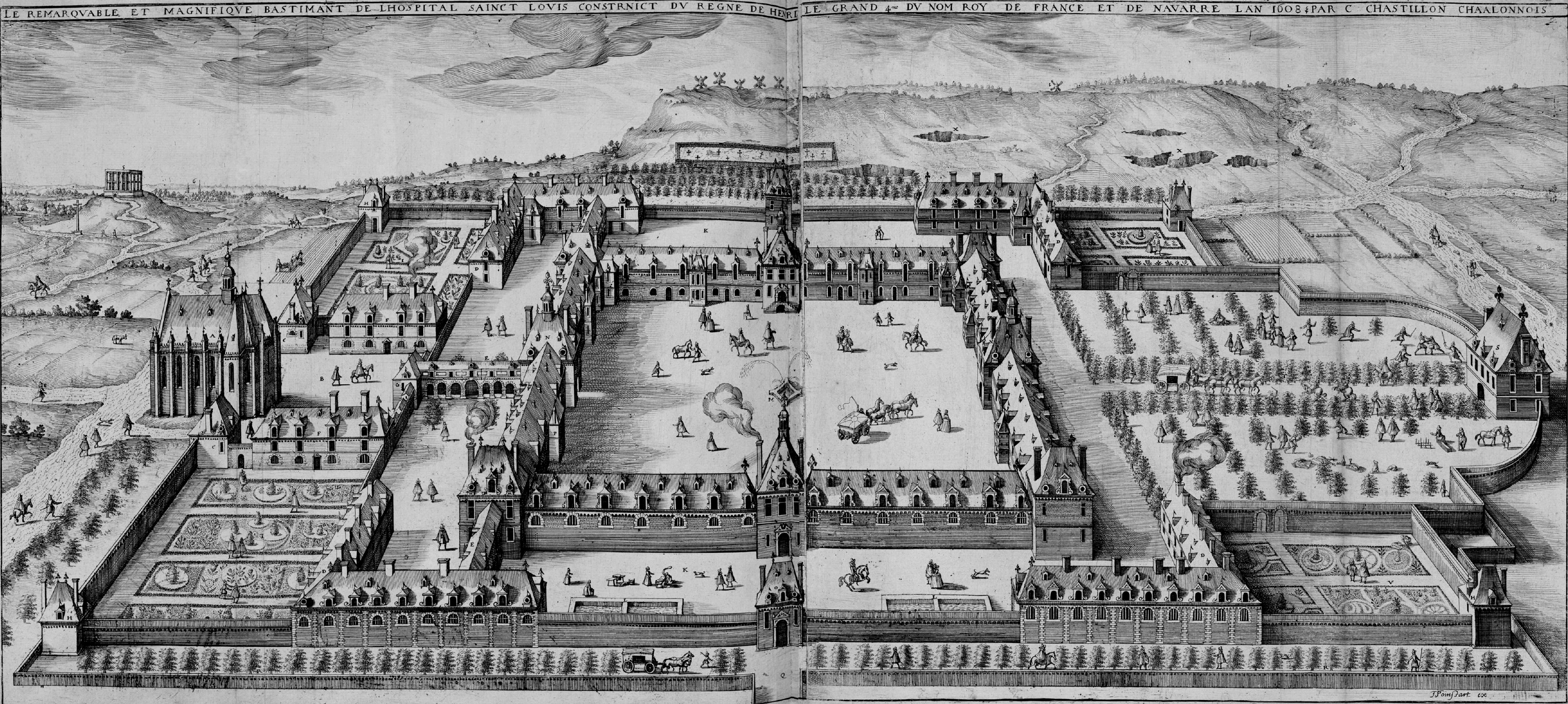 Hopital Saint Louis en 1608 sous le règne d'Henri IV.